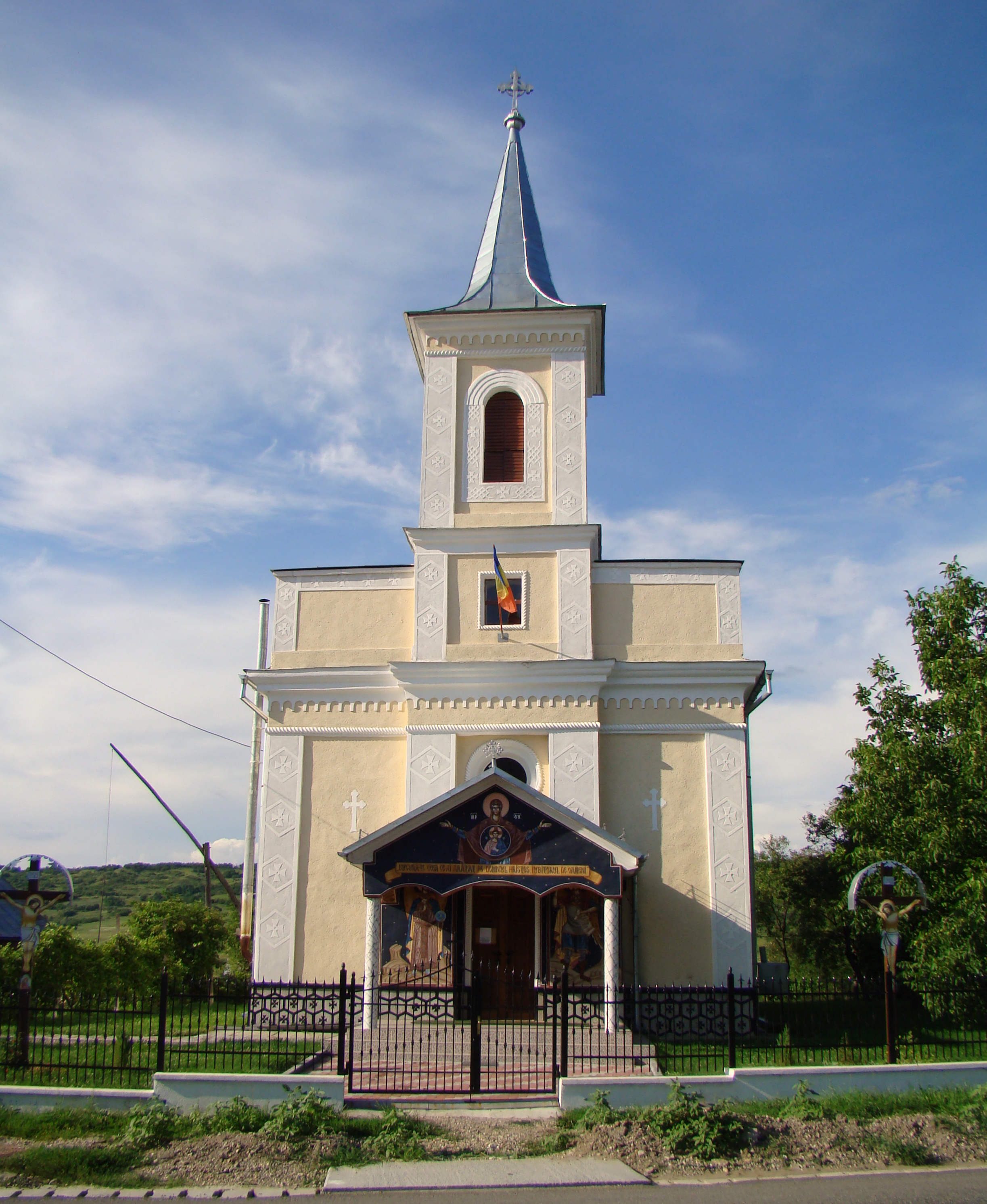 Biserica ortodoxă din Șintereag